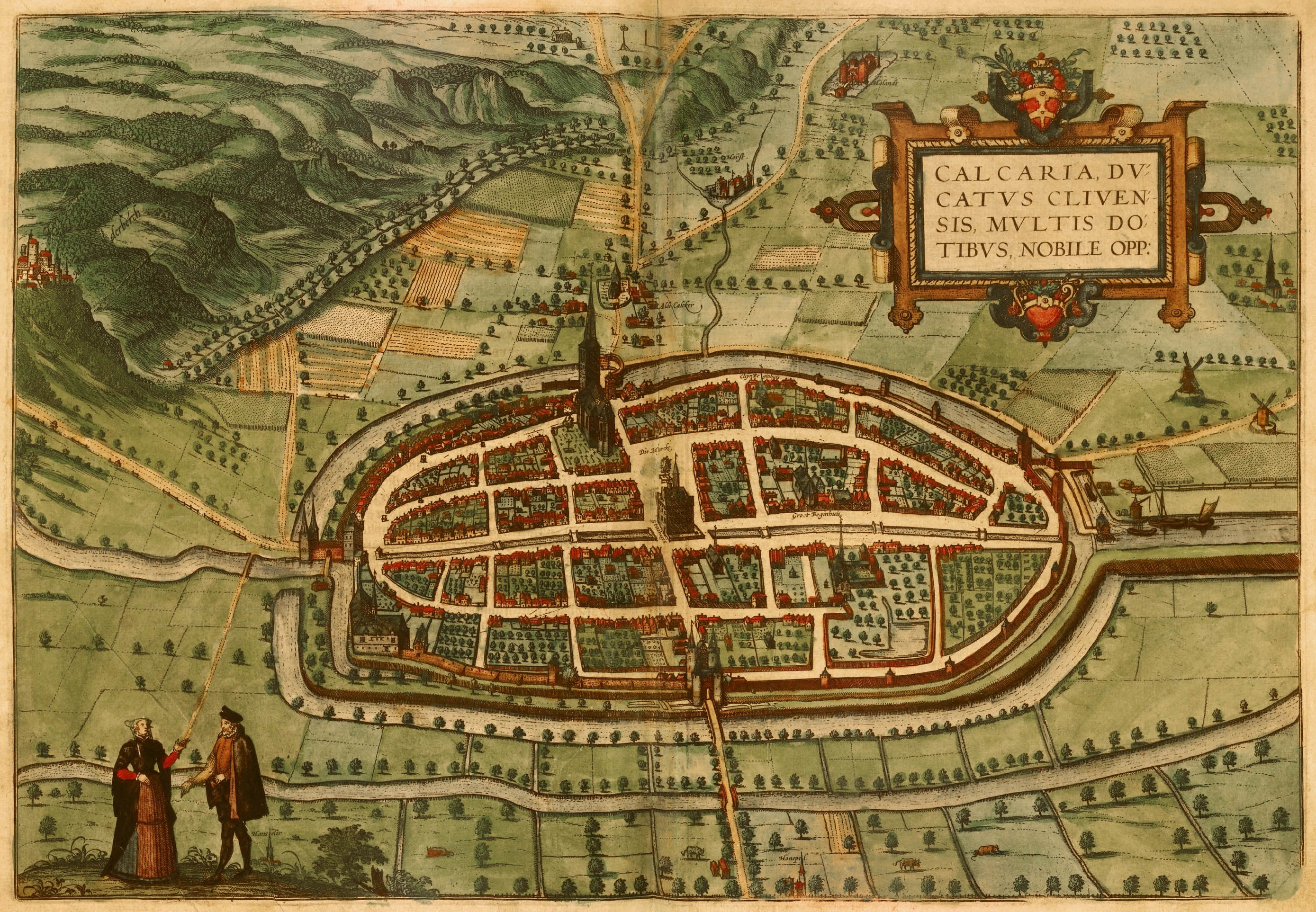 Ansicht der Stadt Kalkar aus Braun und Hogenbergs Civitates Orbis Terrarum, Band 2